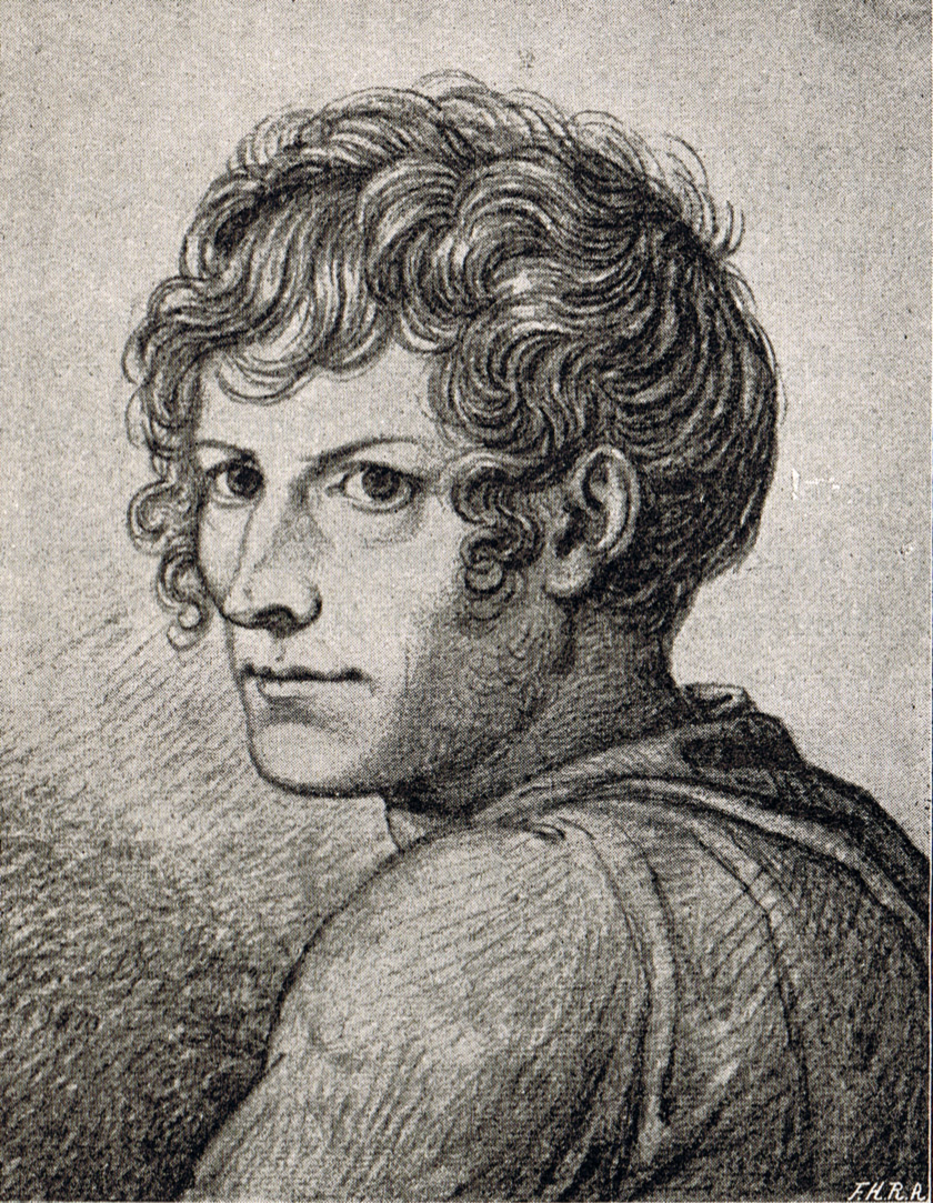 Bertel Thorvaldsen som ung; Skulle iflg. Begtrup være et selvportræt, trods signaturen.